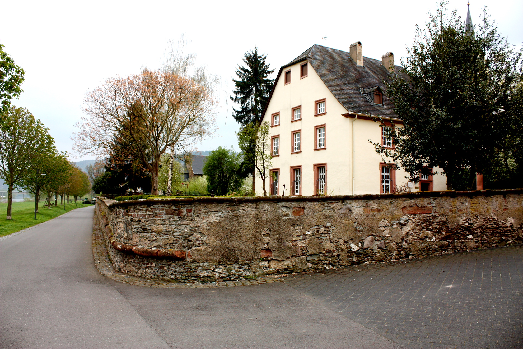 Ehemaliges Wohnhaus der Lösnicher Herrschaft 2012